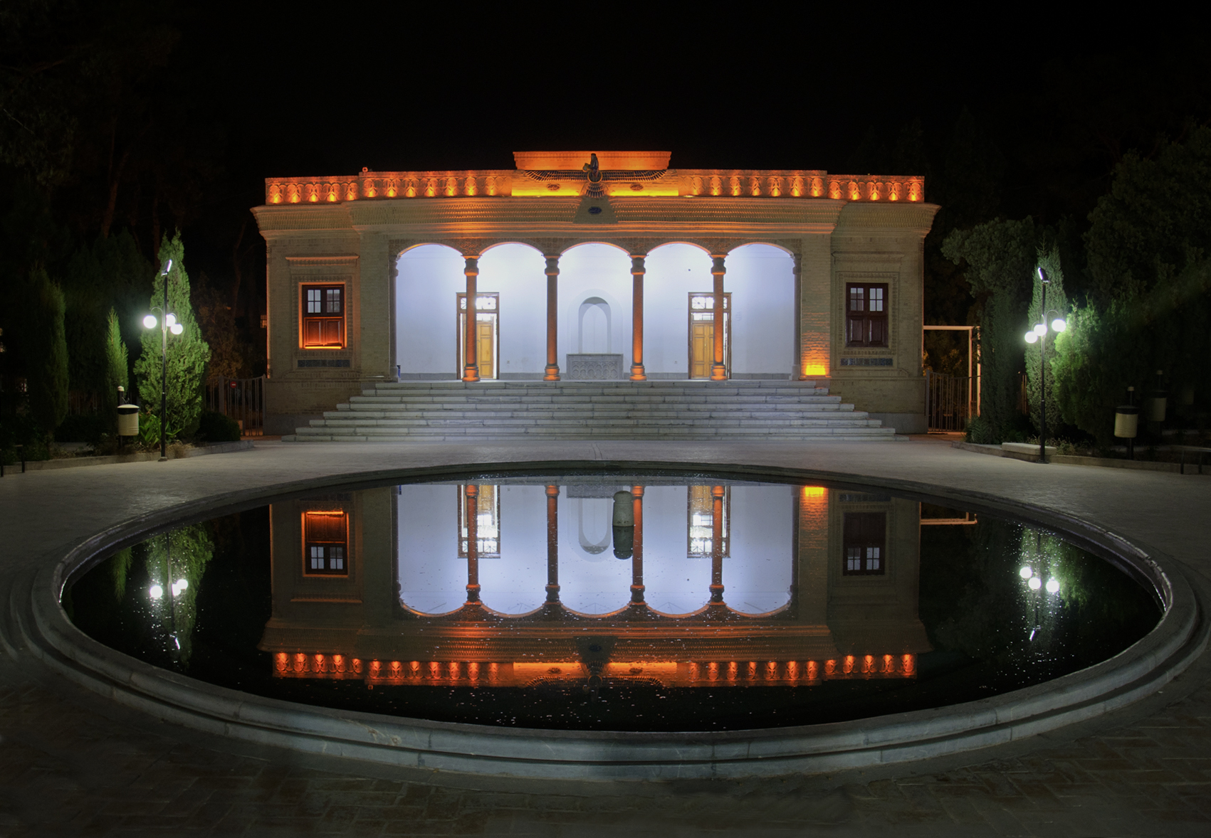 آتشکده یزد